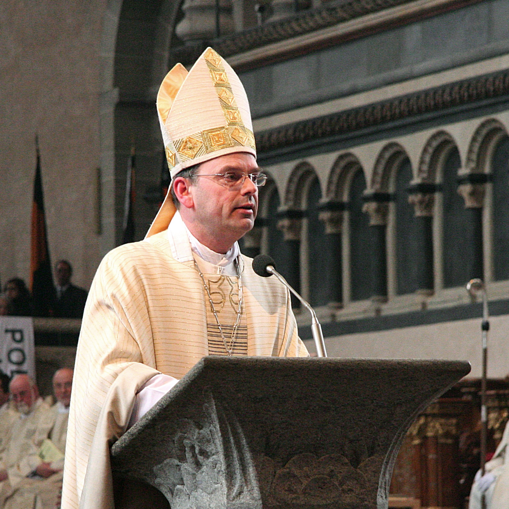 Weihbischof Robert Brahm predigt zur 150-Jahr-Feier des Kolpingwerks Diözesanverband Trier im Trierer Dom